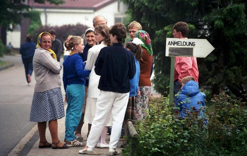 Juni 1988 Friedland Grenzdurchgangslager für Aussiedler und Flüchtlinge Eine Familie aus Tadschikistan